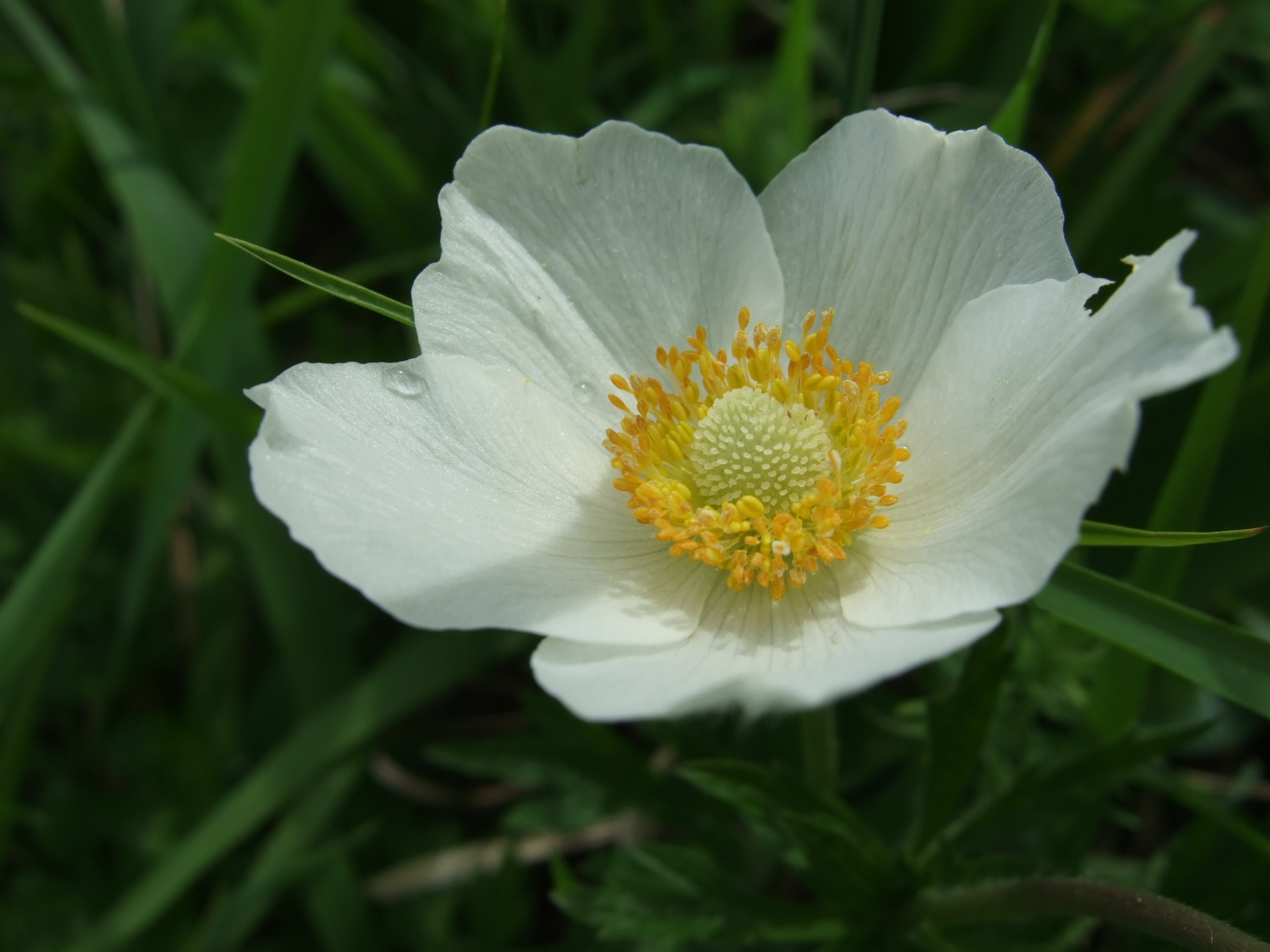 Großes Windröschen, Blüte